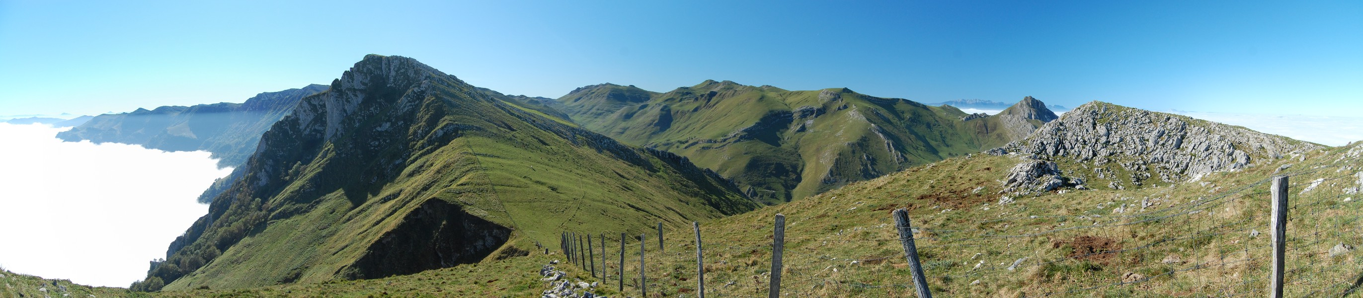 Uakorri, ezkerrean laino gainean, Malloak; erdialdean atzerago, Ganbo; eskuinean, Txindoki eta hondo-hondoan Aizkorri.